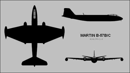 Martin_B57_3D